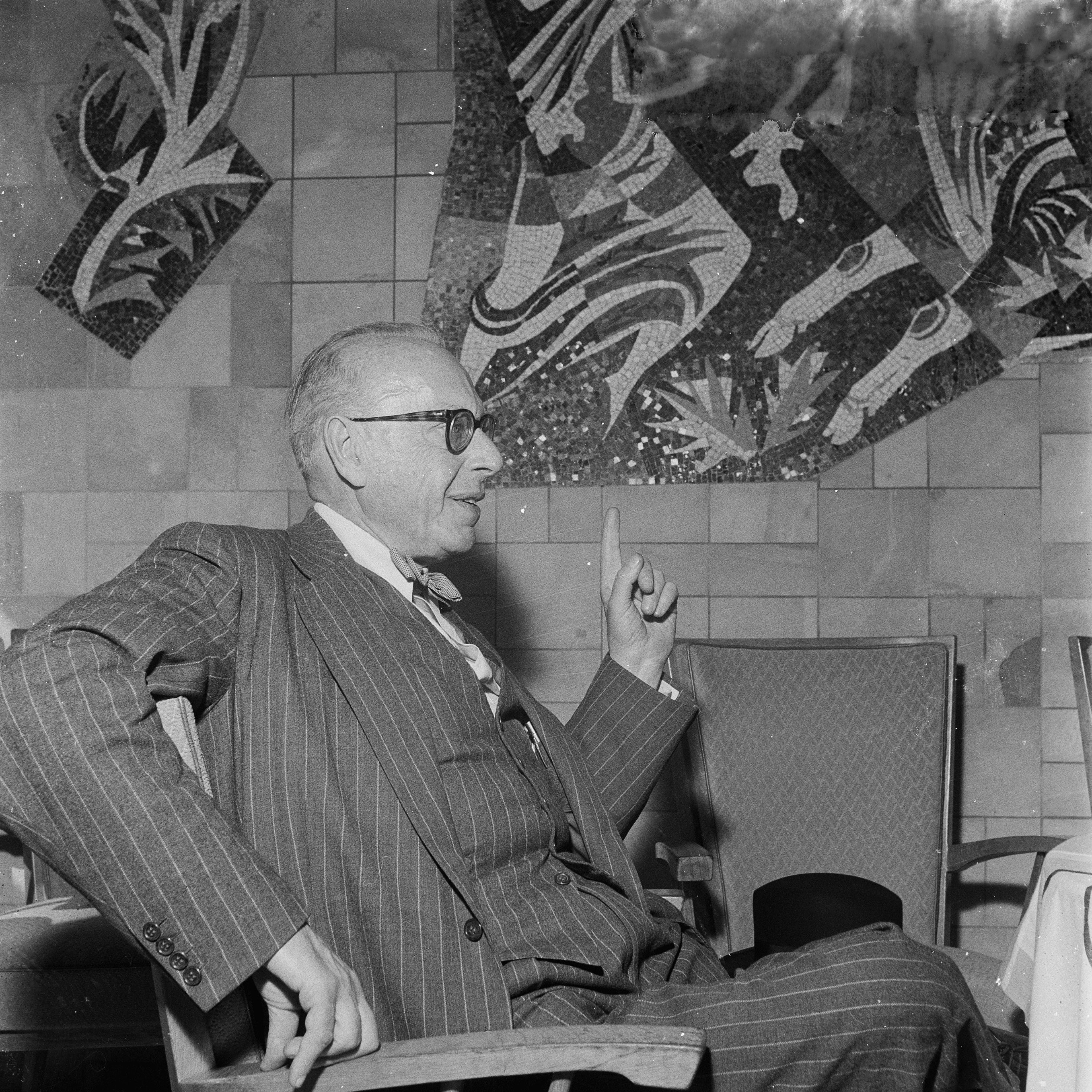 Collectie / Archief : Fotocollectie Anefo Reportage / Serie : [ onbekend ] Beschrijving : George Szell , dirigent, en Clevelandorkest op Schiphol Datum : 14 juni 1957 Locatie : Noord-Holland, Schiphol Trefwoorden : dirigenten Persoonsnaam : George Szell Fotograaf : Koch, Eric / Anefo Auteursrechthebbende : Nationaal Archief Materiaalsoort : Negatief (zwart/wit) Nummer archiefinventaris : bekijk toegang 2.24.01.03 Bestanddeelnummer : 908-6780